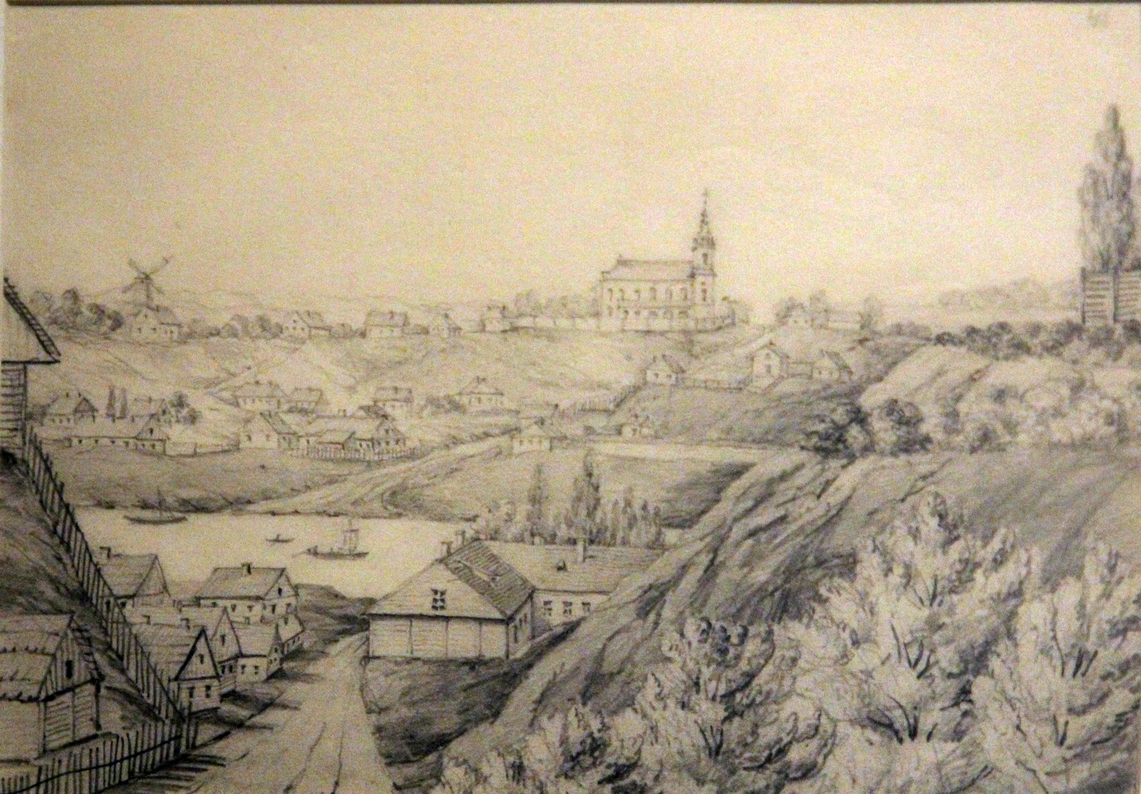 Занёманскае прадмесце